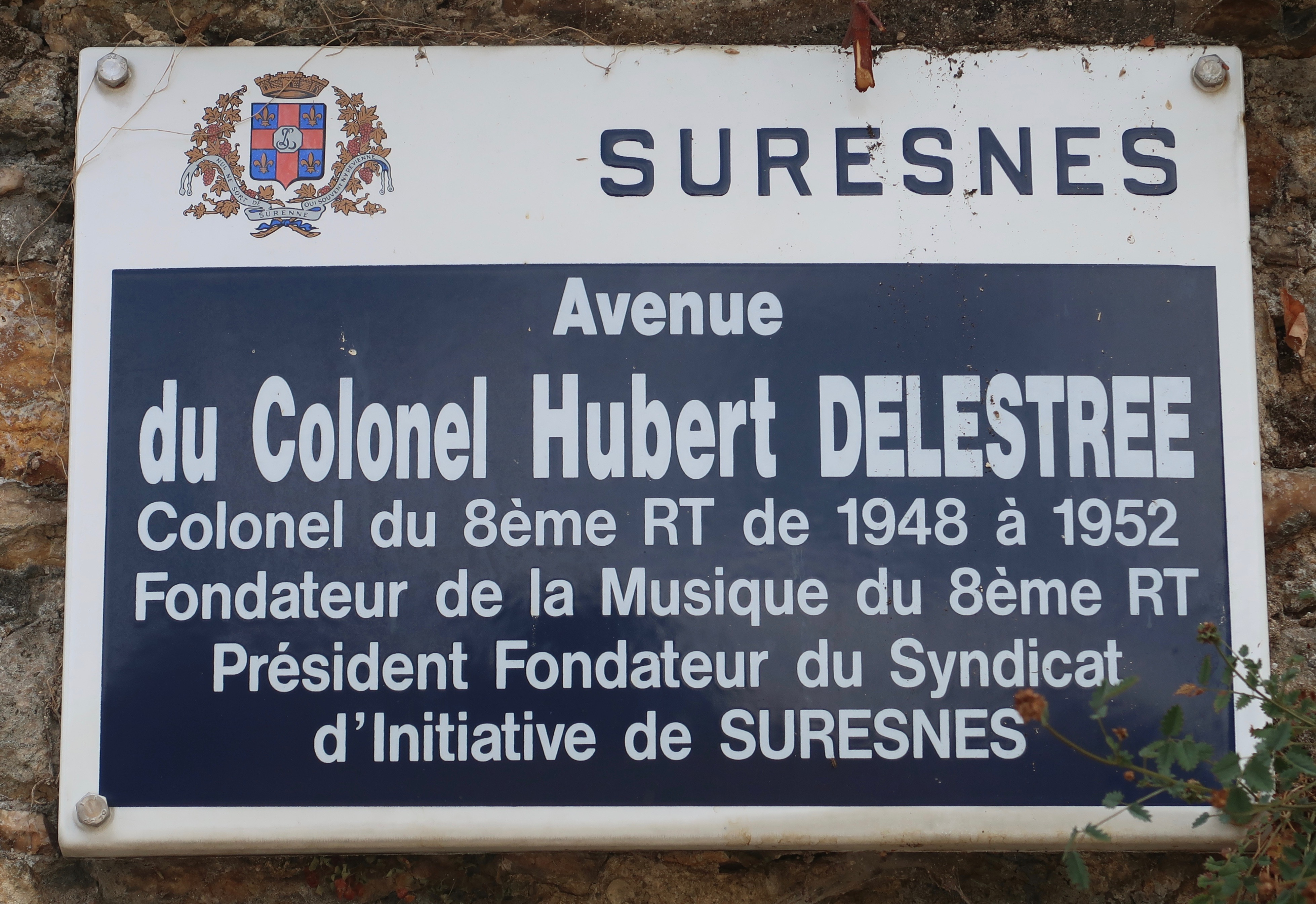 Plaque de l'avenue Hubert-Delestrée à Suresnes (Hauts-de-Seine).